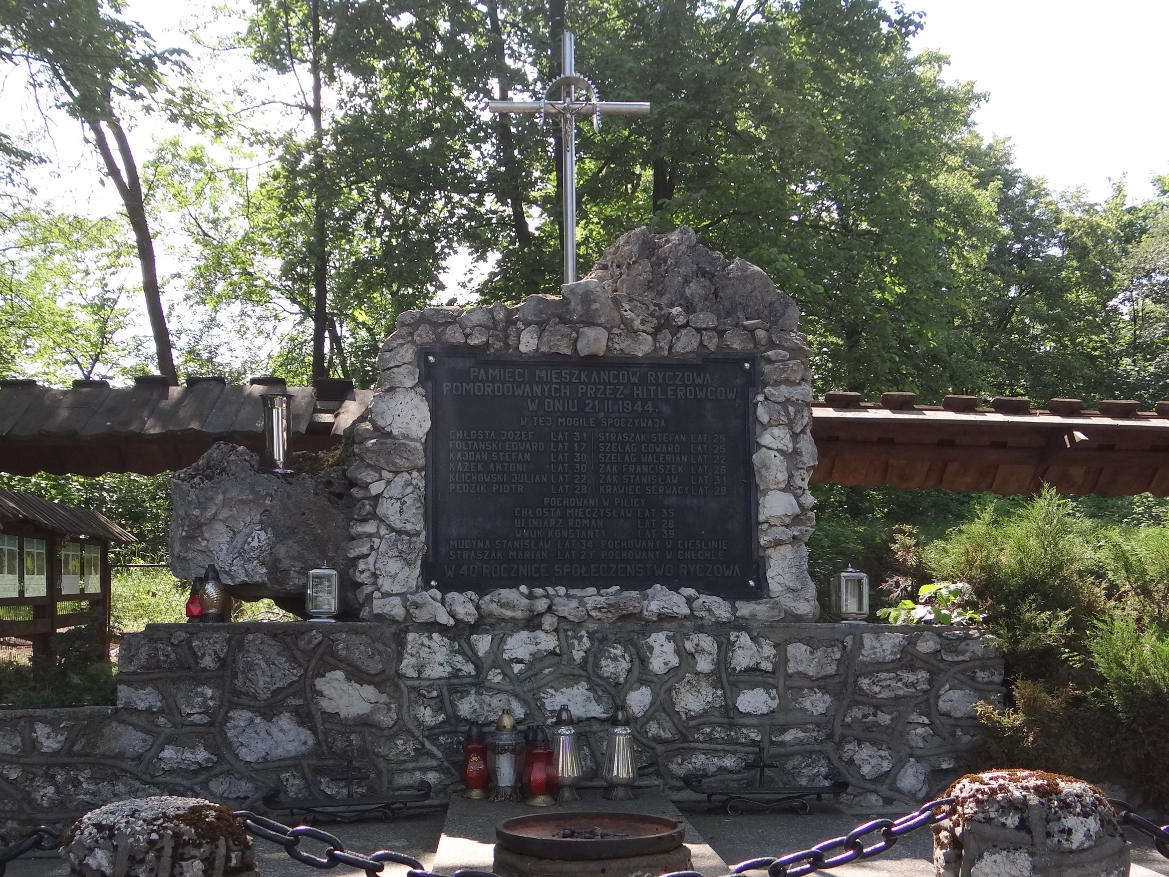 Pomnik na zbiorowej mogile w Ryczowie